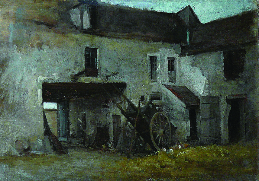 Curtea Hanului Ganne la Barbizon, Ulei pe lemn, nedatat - Muzeul de Artă din Craiova. Peisaj cu curtea interioară a unui han din mica localitate Barbizon, situată în vestul pădurii Fontainebleau, unde Grigorescu a locuit în anii de formare. Lucrarea are efectul întunecat al primelor pânze din perioada franceză.